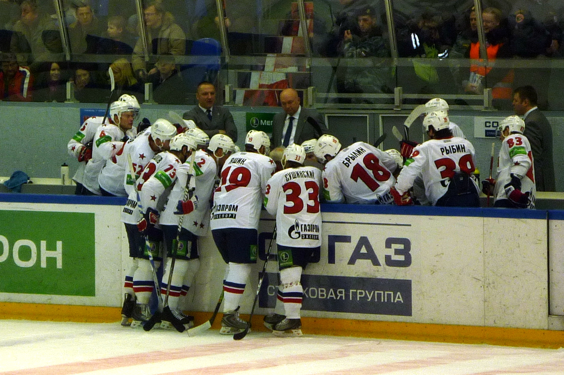 Тайм-аут, взятый питерским СКА после пятой шайбы, пропущенной от нижегородского «Торпедо» в матче 12 декабря 2010 года